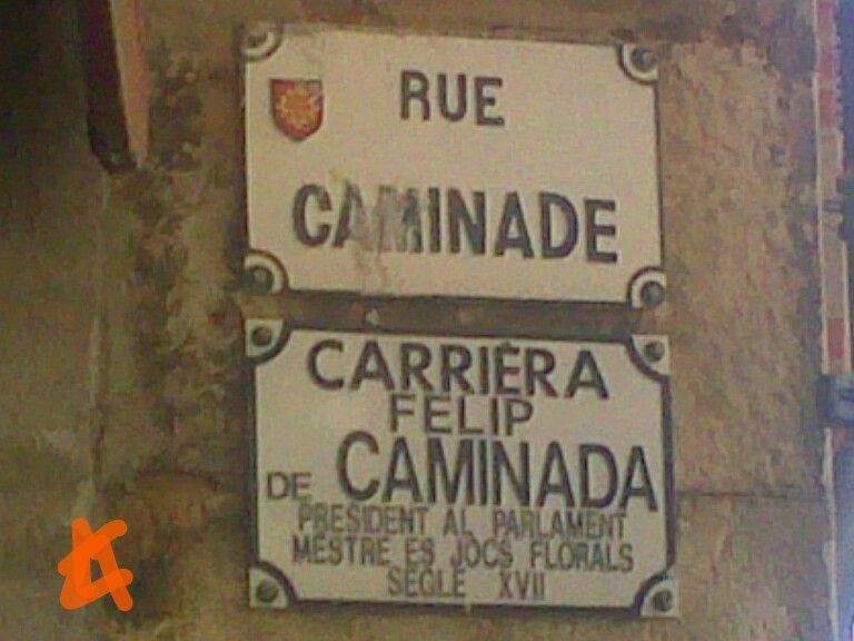 Inscripcion bilenga a Tolosa "Carrièra Felipe de Caminada, president al parlament, mèstre es jòcs florals, sègle XVII"